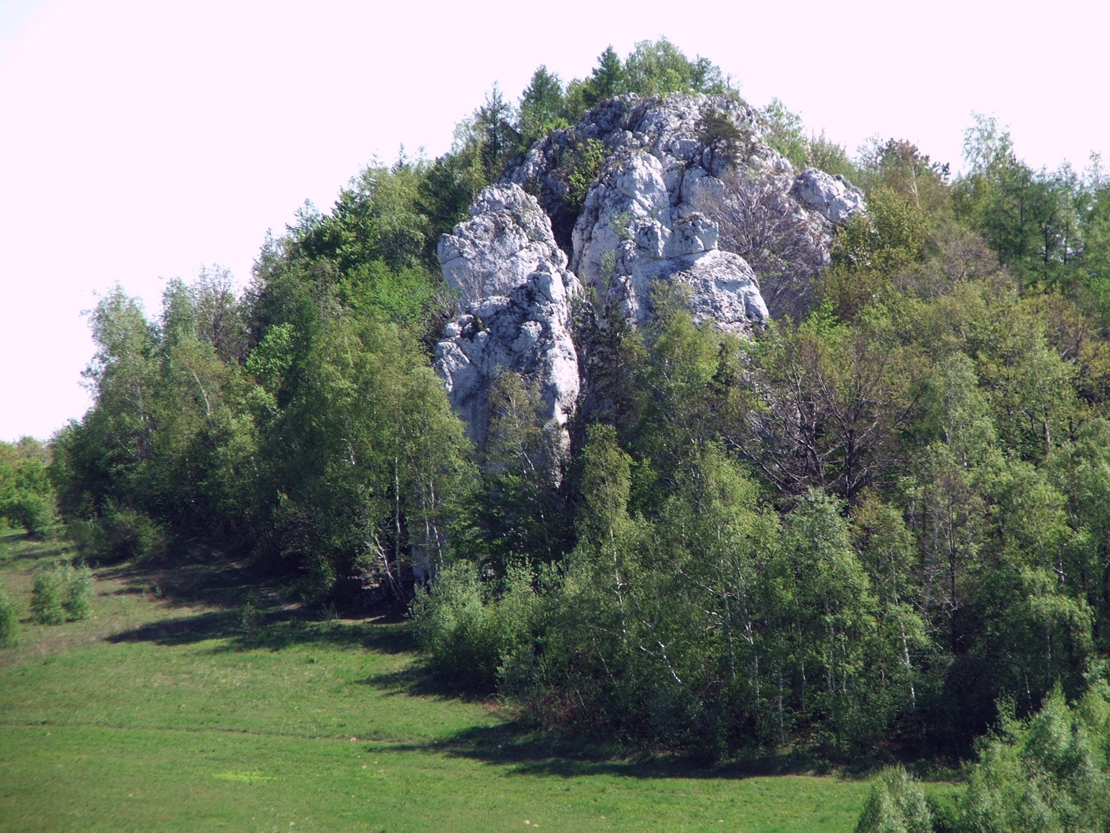 Dolina Szklarki. Witkowe Sokoliki (Dolinki Krakowskie)